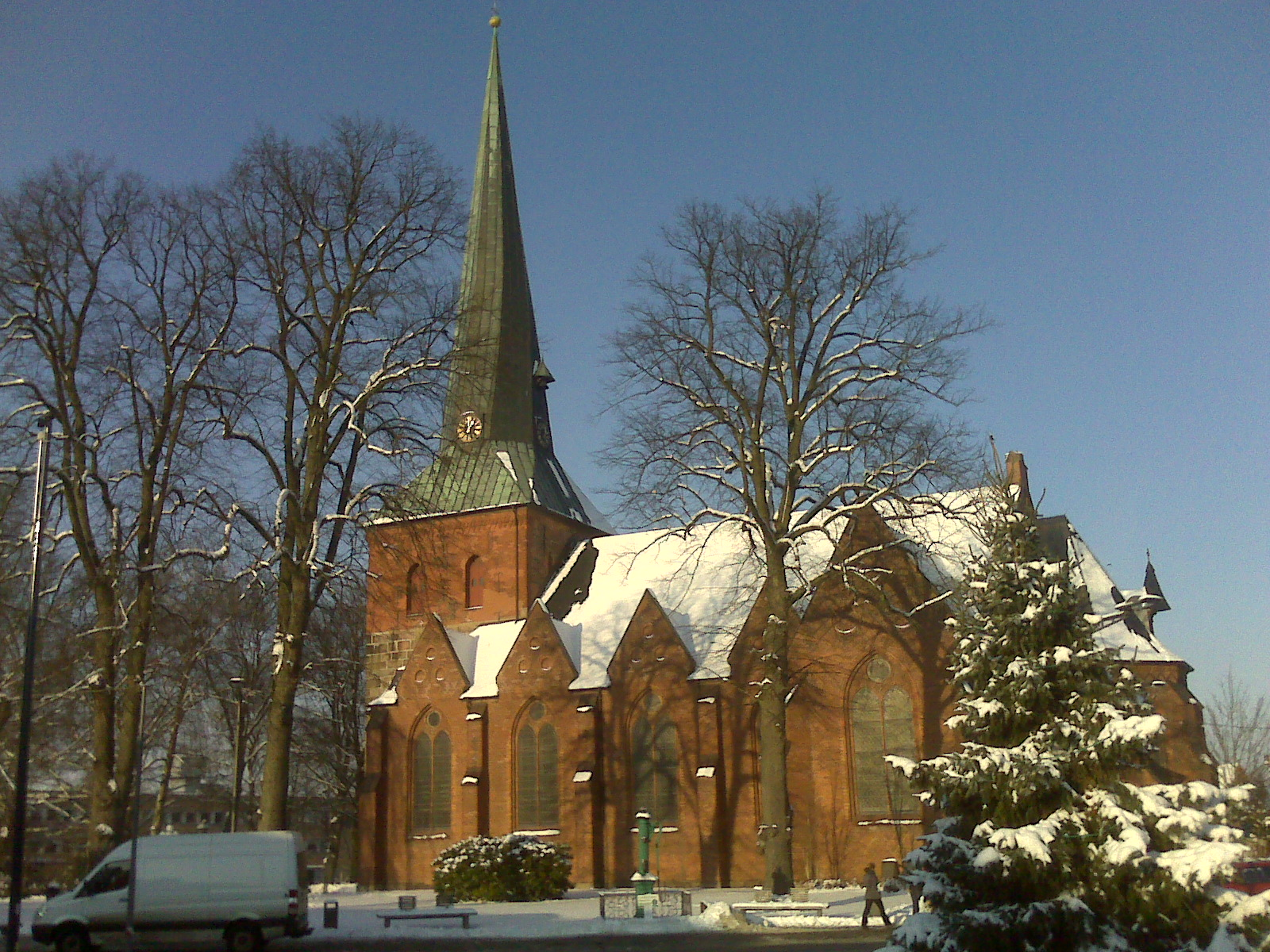 Kirche St. Martin in Nortorf (bei Neumünster)